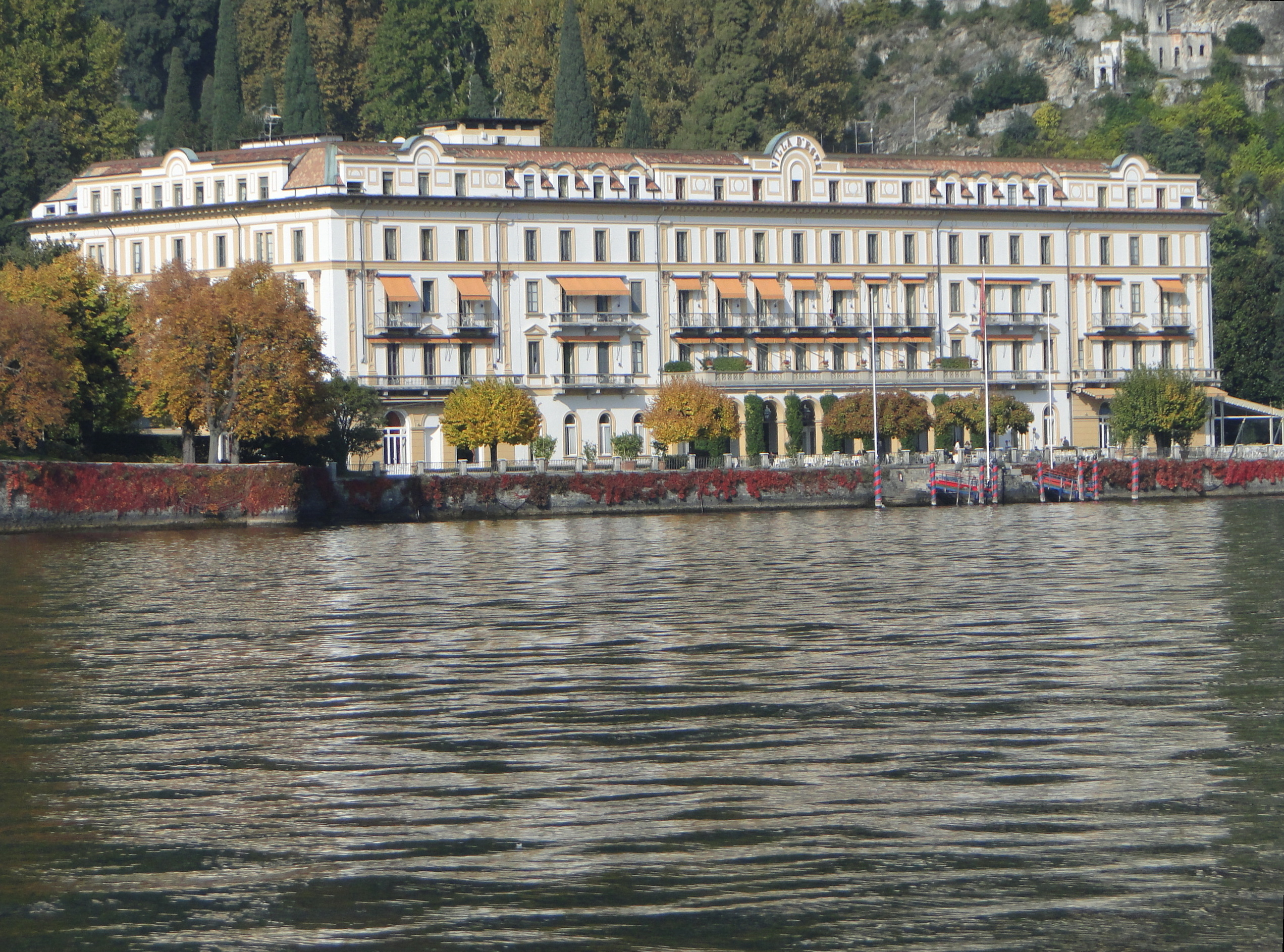 Como